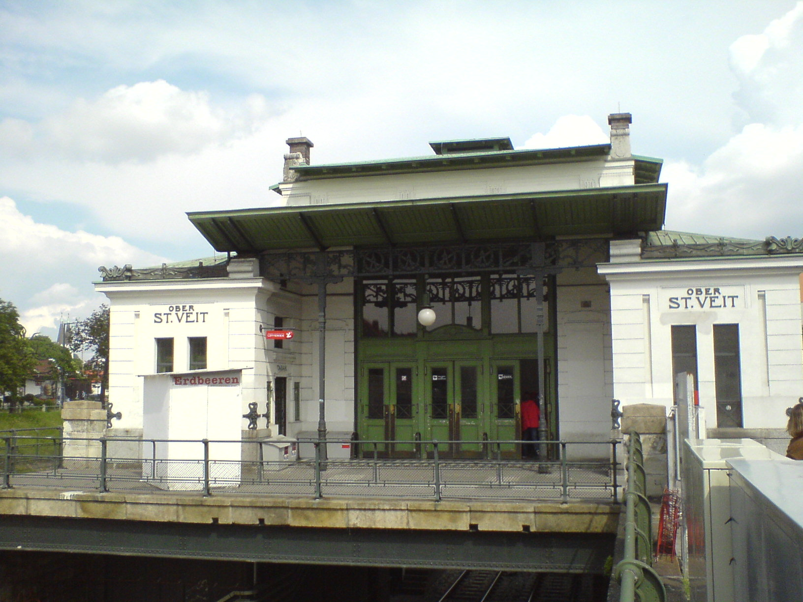 Historisches Aufnahmegebäude des Wiener U-Bahnhofs Ober St. Veit